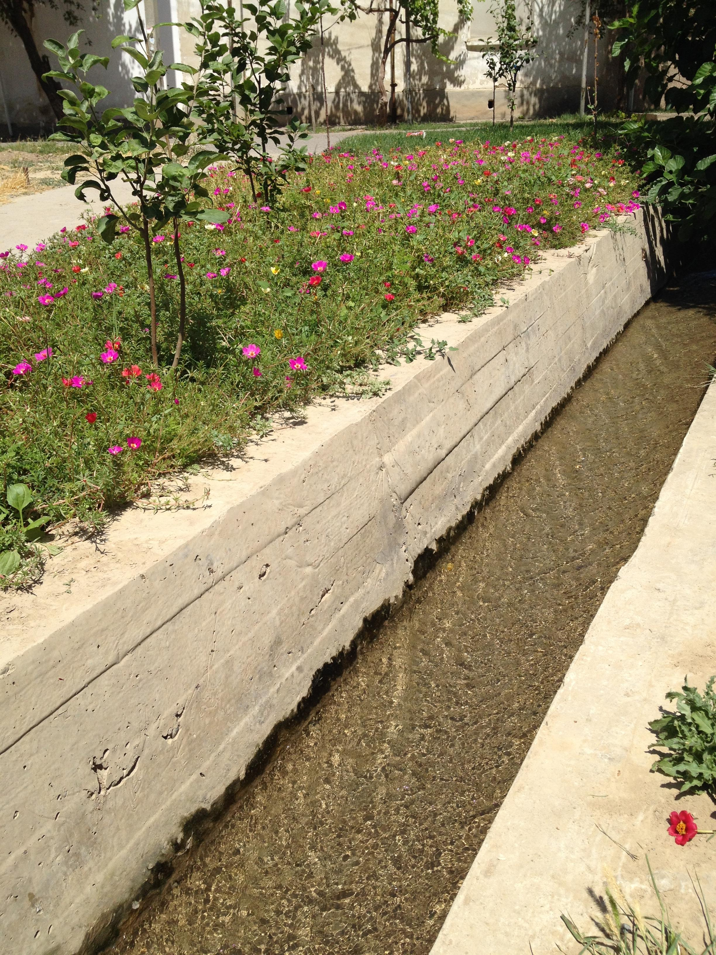 Канал (арык) БирликOʻzbekcha/ўзбекча: Birlik arig‘i (kanali)